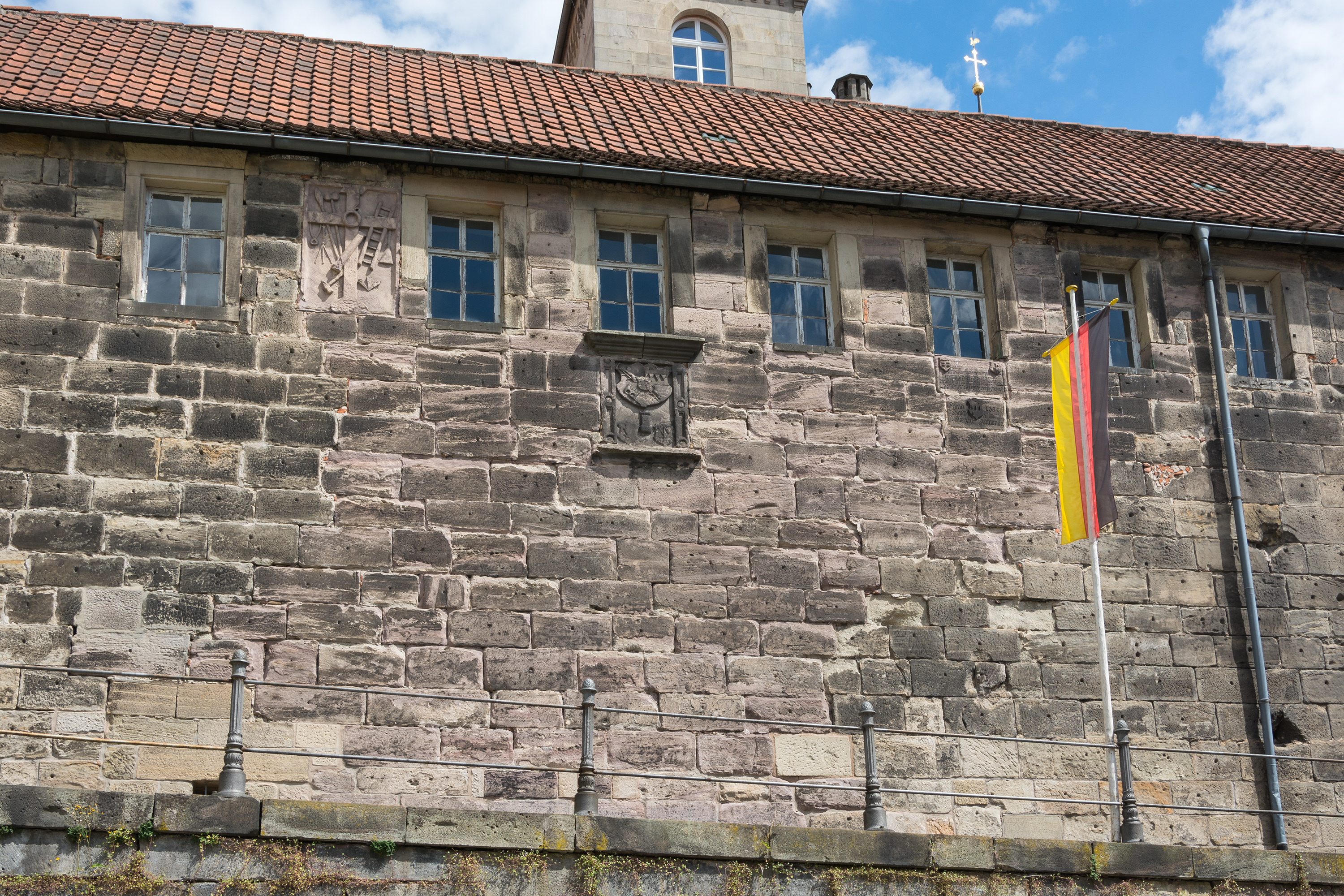 Während des Dreißigjährigen Krieges gelang es den auf schwedischer Seite kämpfenden Truppen des Herzogs Bernhard von Sachsen-Weimar bei einem Angriff am 21. März 1634 eine Bresche in die Stadtmauer der oberfränkischen Stadt Kronach zu schlagen. Aufgrund der entschiedenen Gegenwehr ihrer Bewohner führte dies jedoch nicht zur Einnahme der Stadt. Das Ausmaß der damaligen Zerstörung ist heute noch anhand der abweichenden rötlichen Färbung des Sandsteins erkennbar, der zum Schließen der Lücke verwendet wurde.